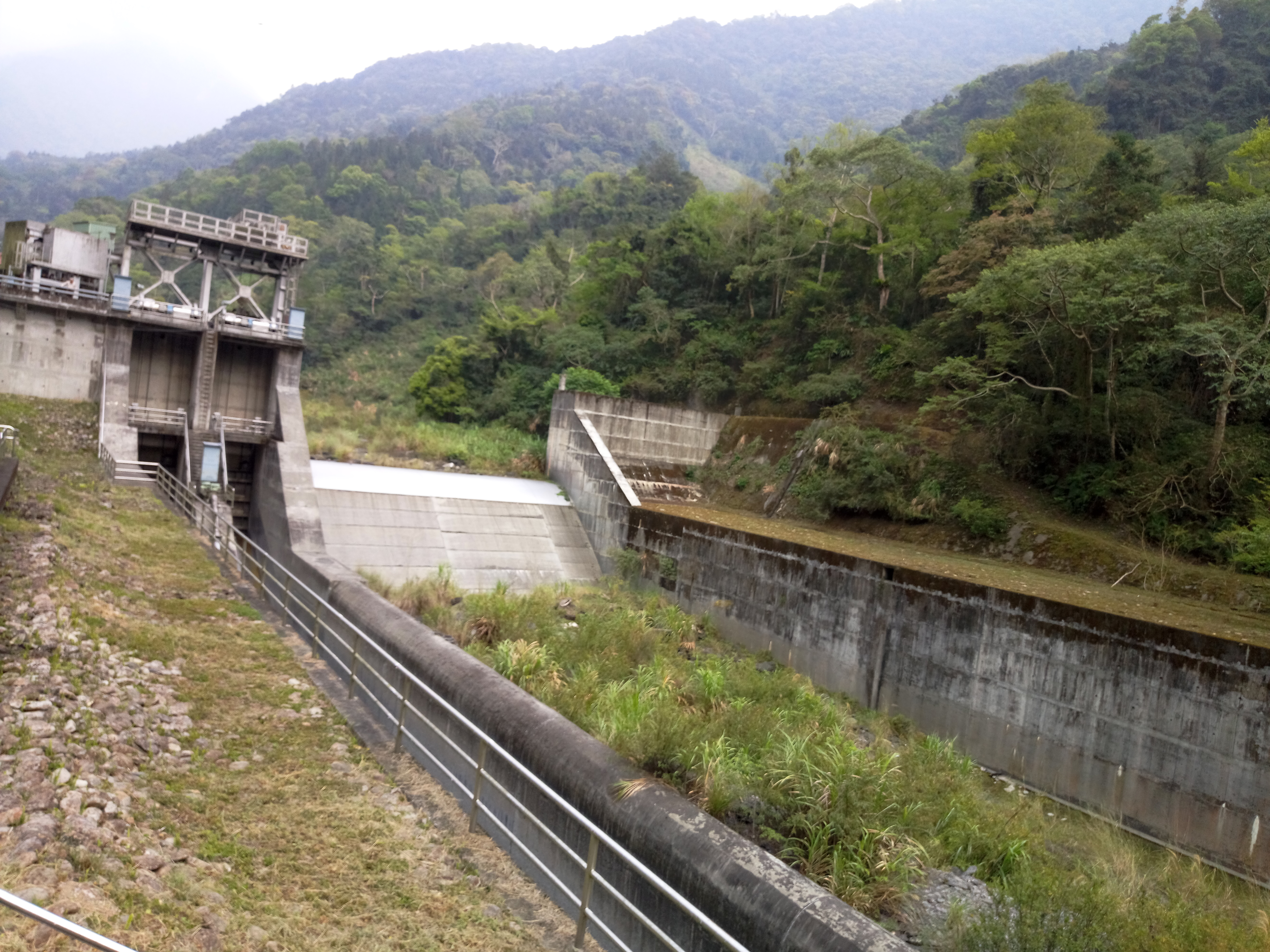 栗栖壩正面